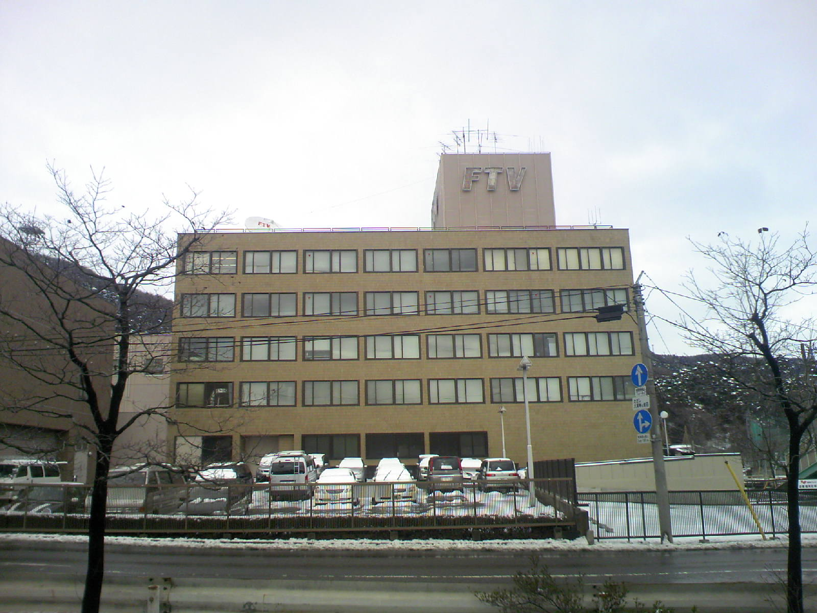 Fukushima Television Broadcasting Co.,Ltd. 福島テレビ本社2